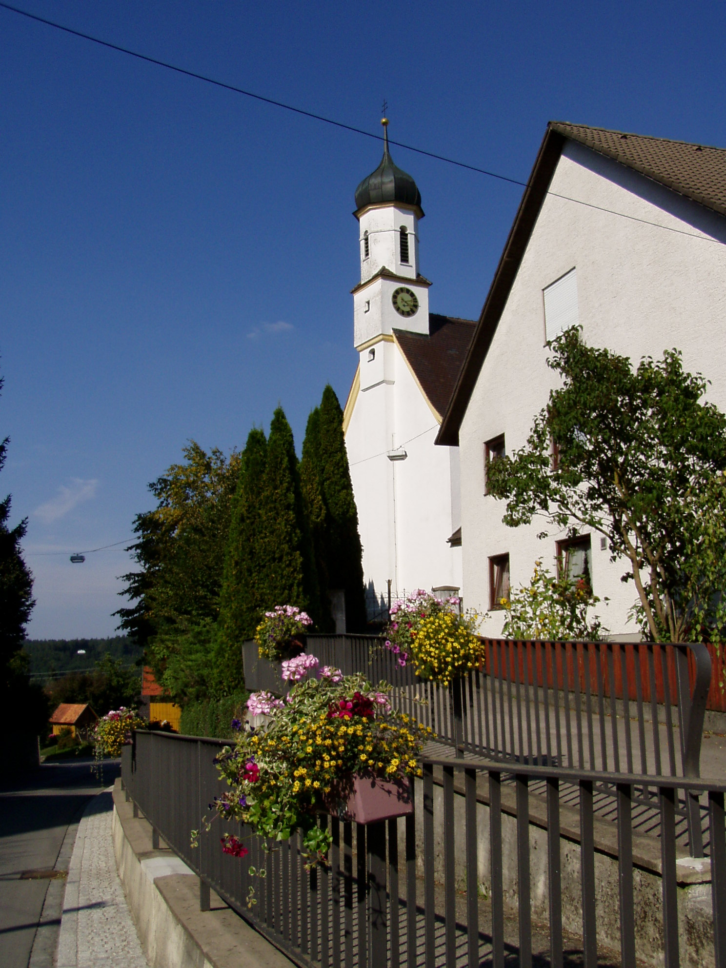 Kapelle in Konradshofen, Scherstetten